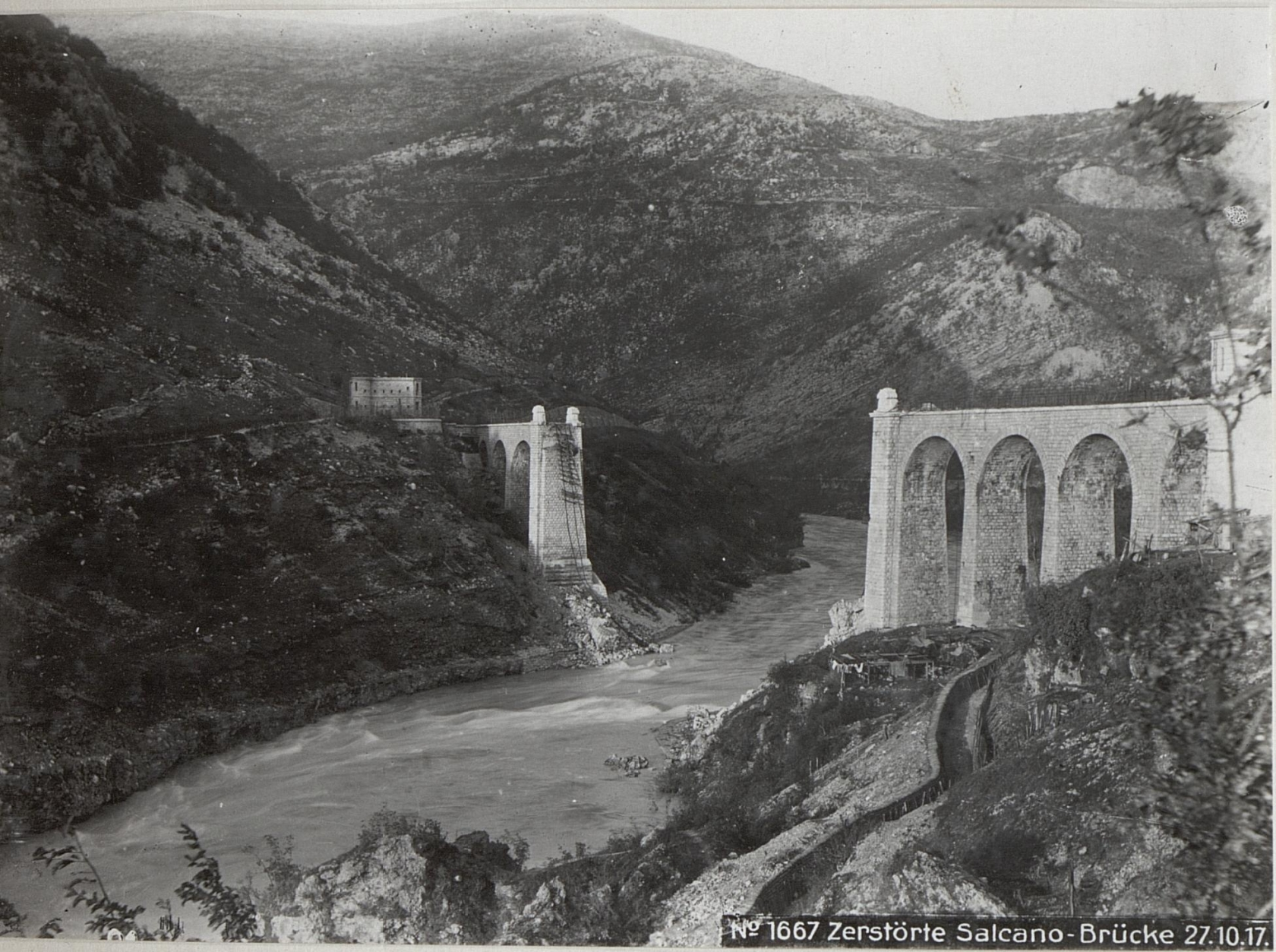 Zerstörte Salcano-Brücke 27.10.17.